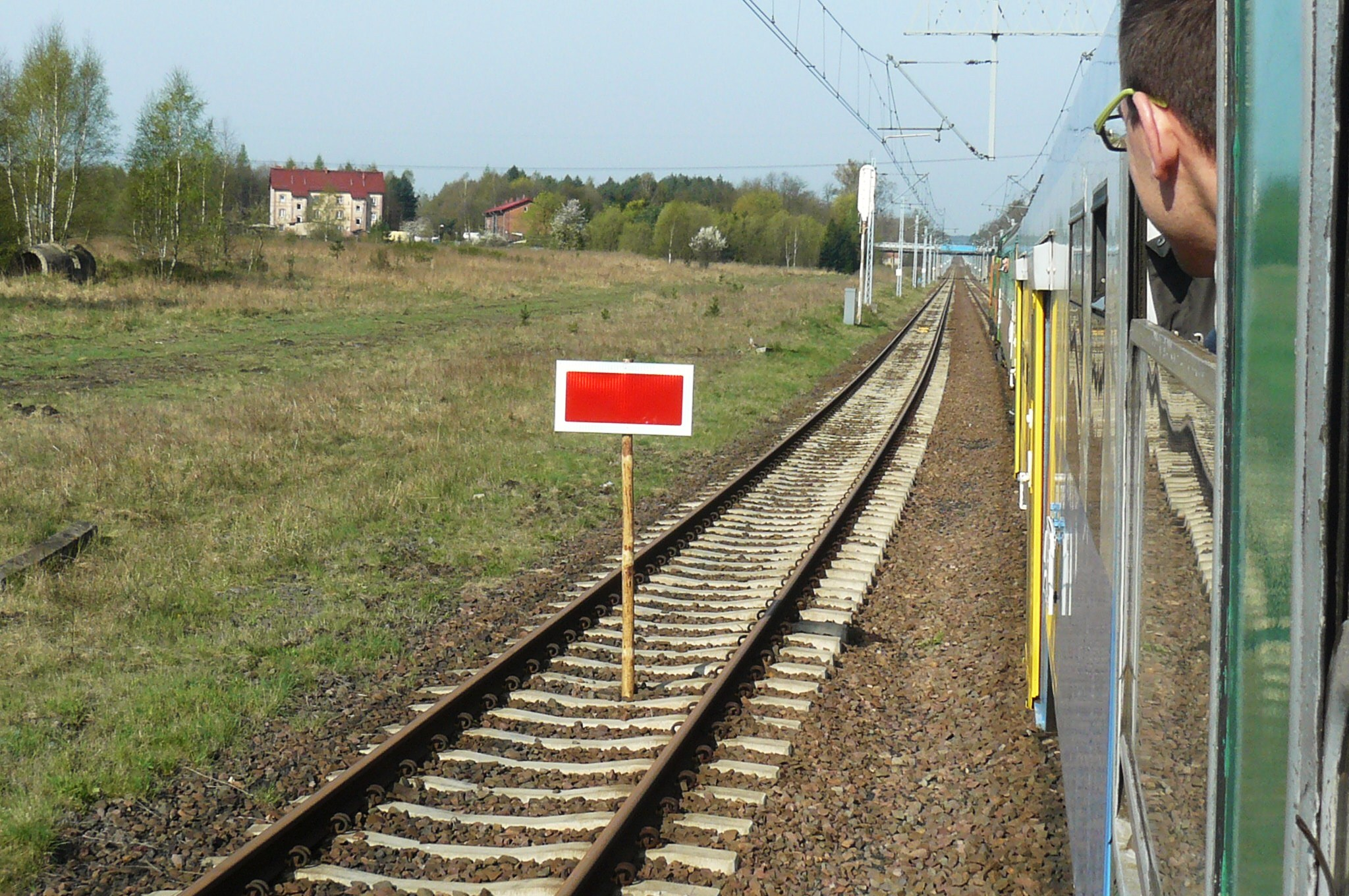 Wyjazd z Węglińca w kierunku Bielawy Dolnej/Horki - tor zamknięty.